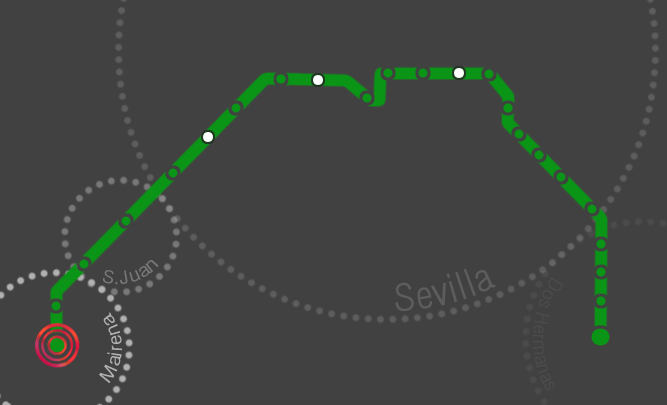 Localizacion estacion